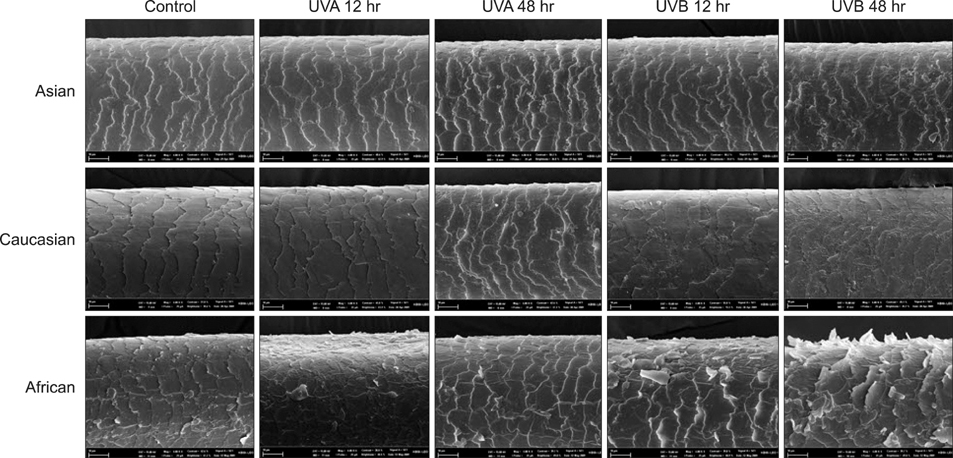 The Ethnic Differences of damaged hair cuticles